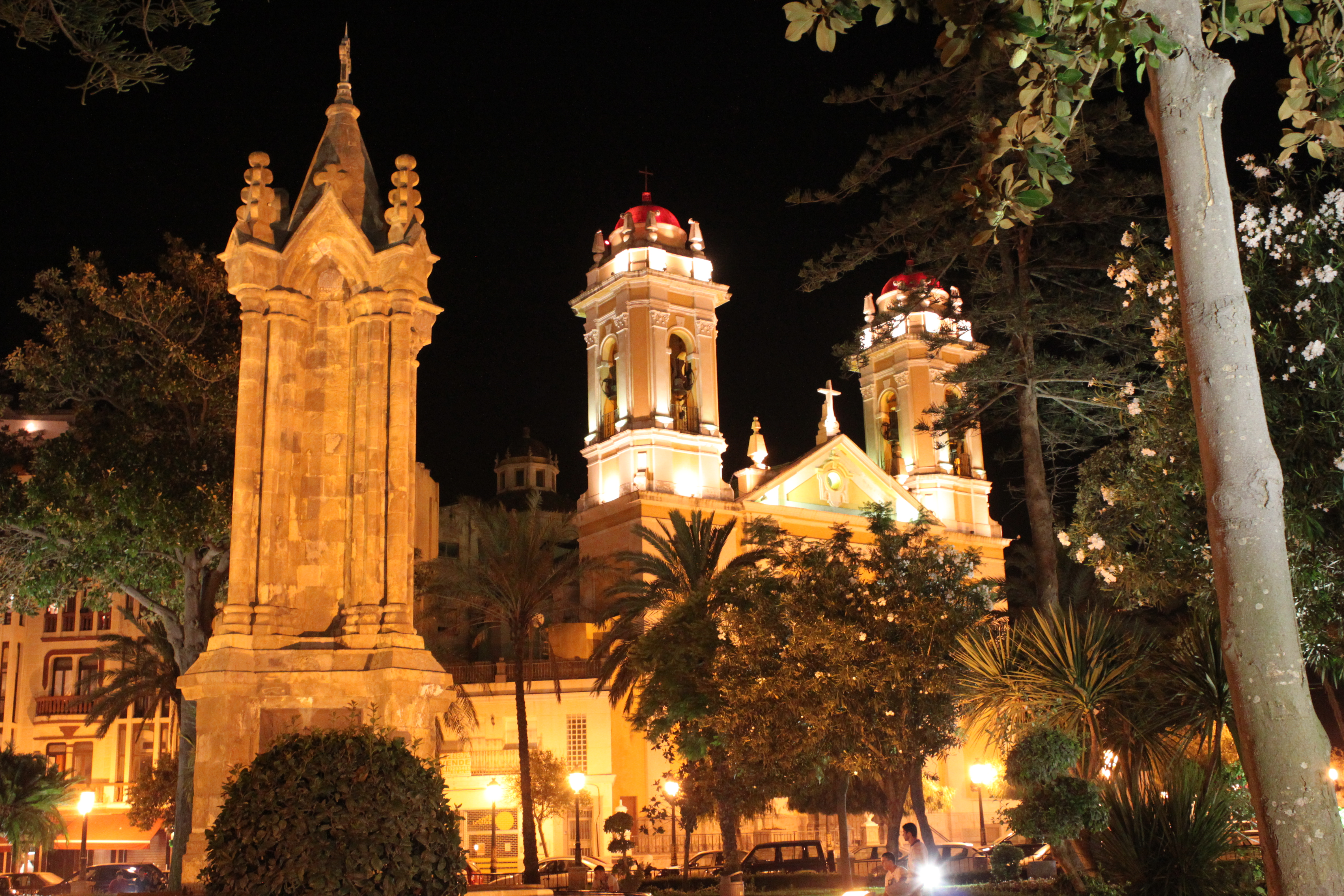 Plaza de África, en Ceuta, de noche. En primer plano el monumento a los Héroes de África. Al fondo, la catedral